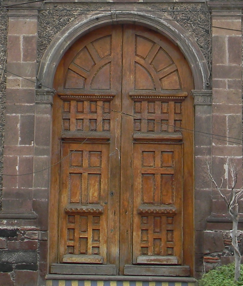 Puerta de madera que permite la entrada al interior de la Capilla de San Cristóbal. La capilla está ubicada en el Barrio de San Cristóbal Xallan, Xochimilco, Ciudad de México.